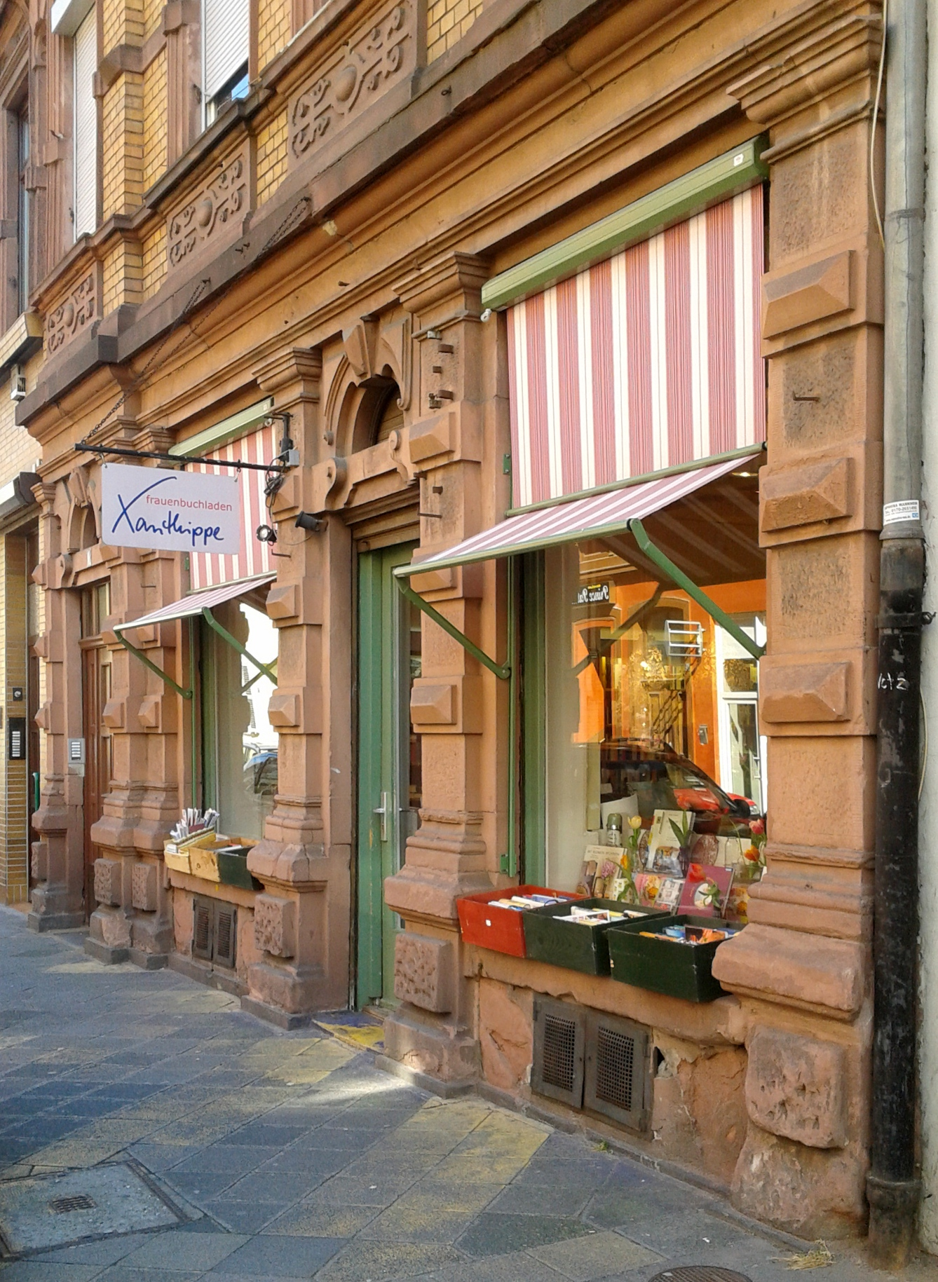 Frauenbuchladen Xanthippe in Mannheim, T3